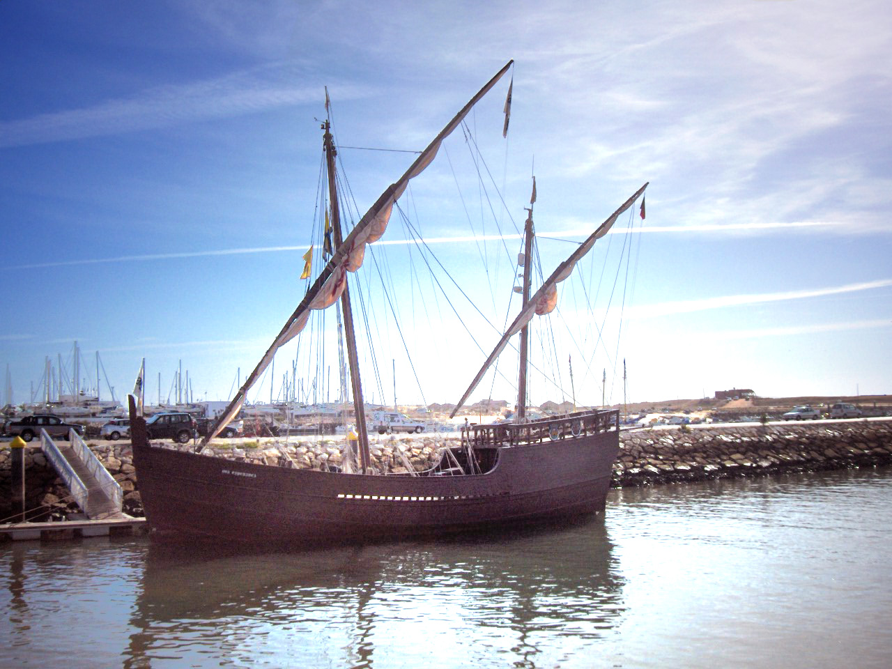 Boa Esperança's Caravel docked in Lagos, Portugal